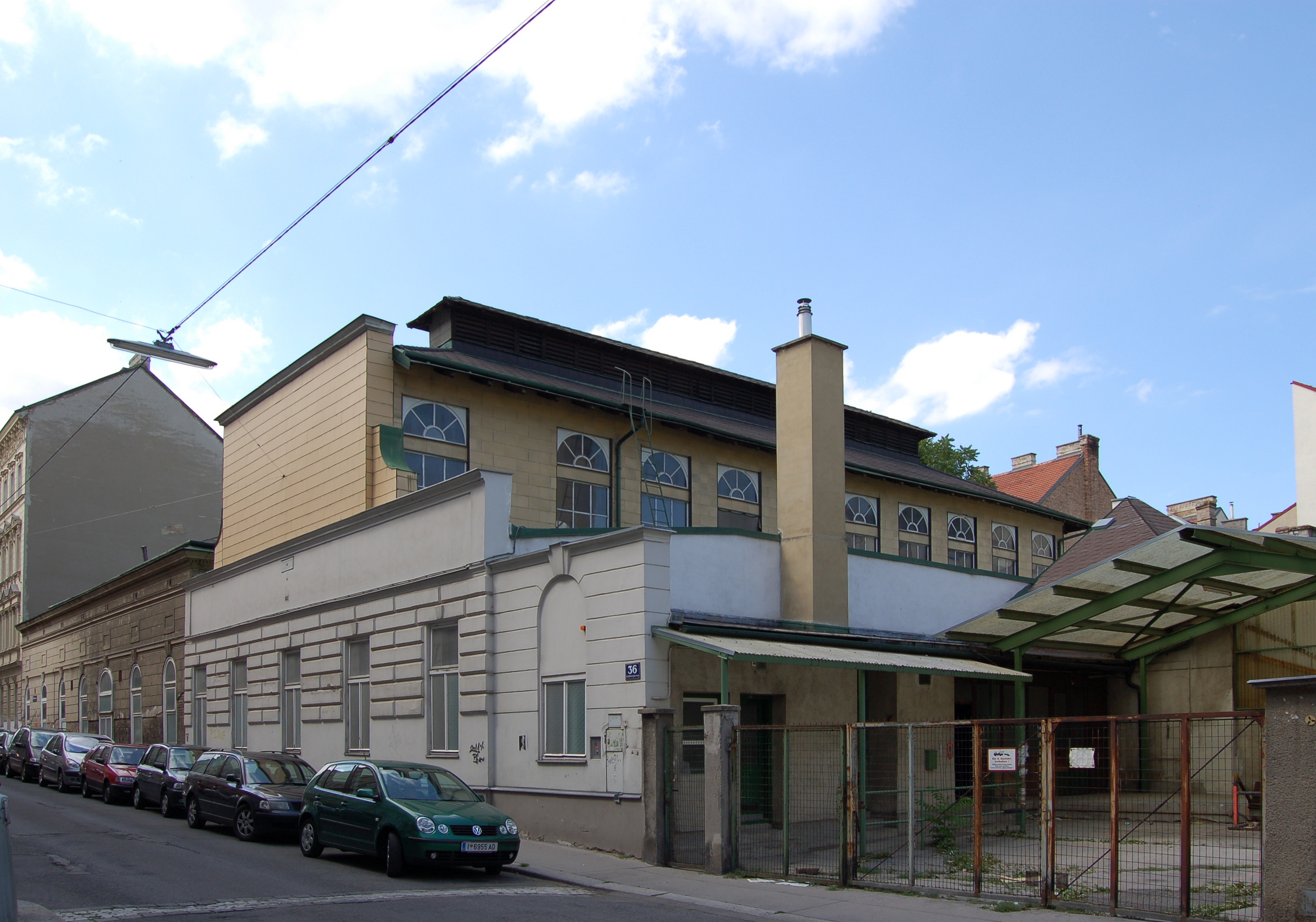 Das denkmalgeschützte Etablissement Gschwandner in der Geblergasse 38-40 (Wien-Hernals) hat sich als eines der letzten ehemaligen vorstädtischen Vergüngungsstätten des 19. Jahrhunderts erhalten. Es wurde 1877nach Plänen von Johann Gschwandner errichtet. Der große, basilikale Saal stammt aus der Bauzeit und wurde 1887 sowie 1906 erweitert, von der Ausstattung haben sich jedoch nur mehr Reste erhalten.